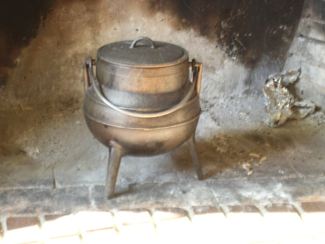 Pote (Pot)